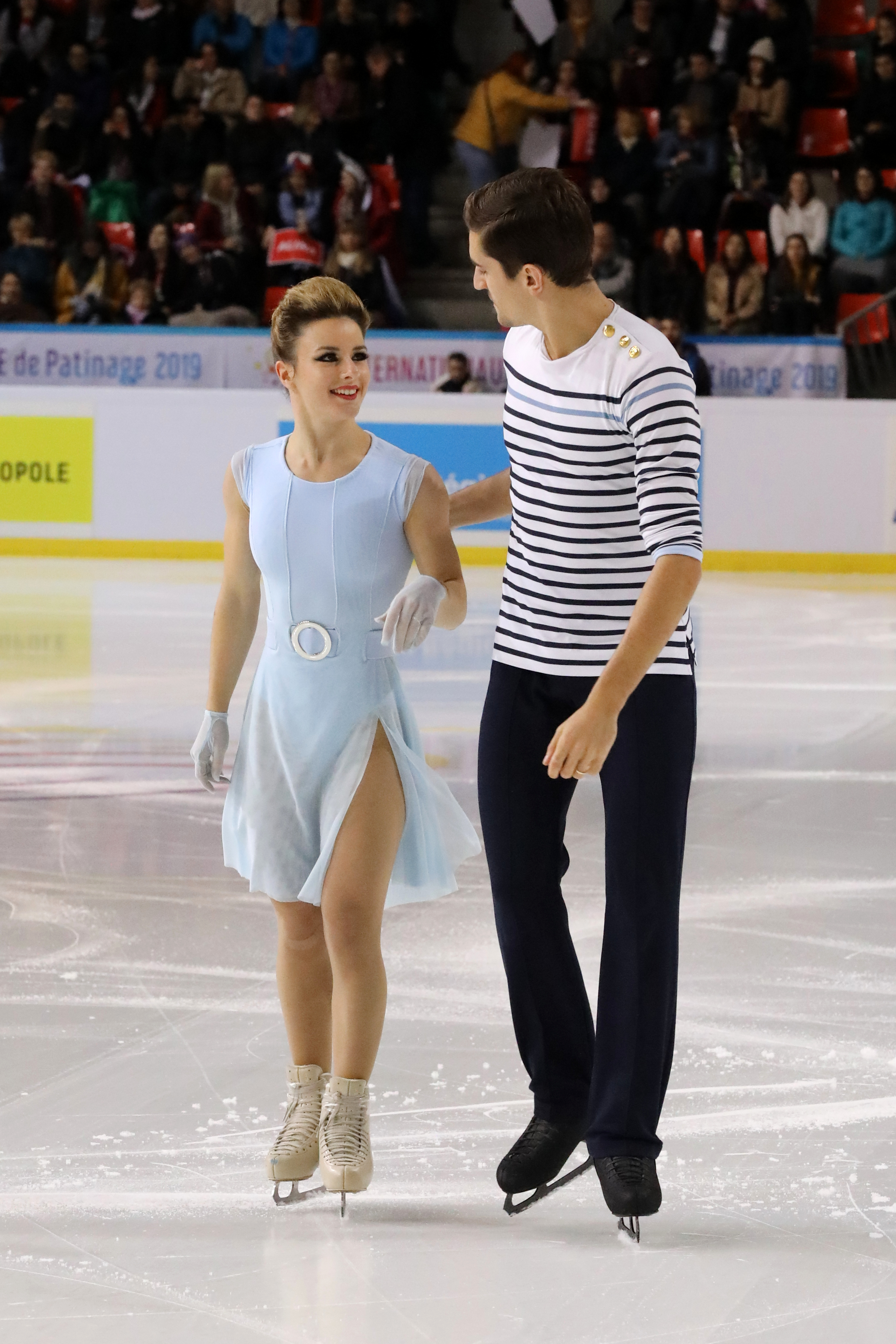 Échauffement des couples en danse sur glace, Internationaux de France 2019.